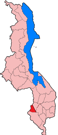 ムワンザ県（Mwanza District）の位置（2003年、ネノen:Neno District分離後） 参考：[1]